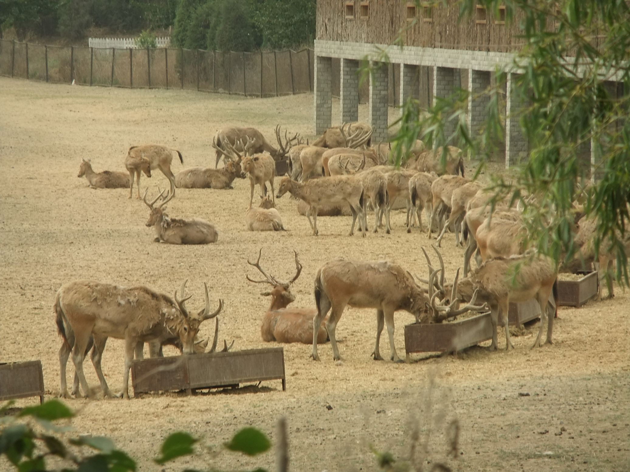 麋鹿 - Pere David's Deer - 2011.05